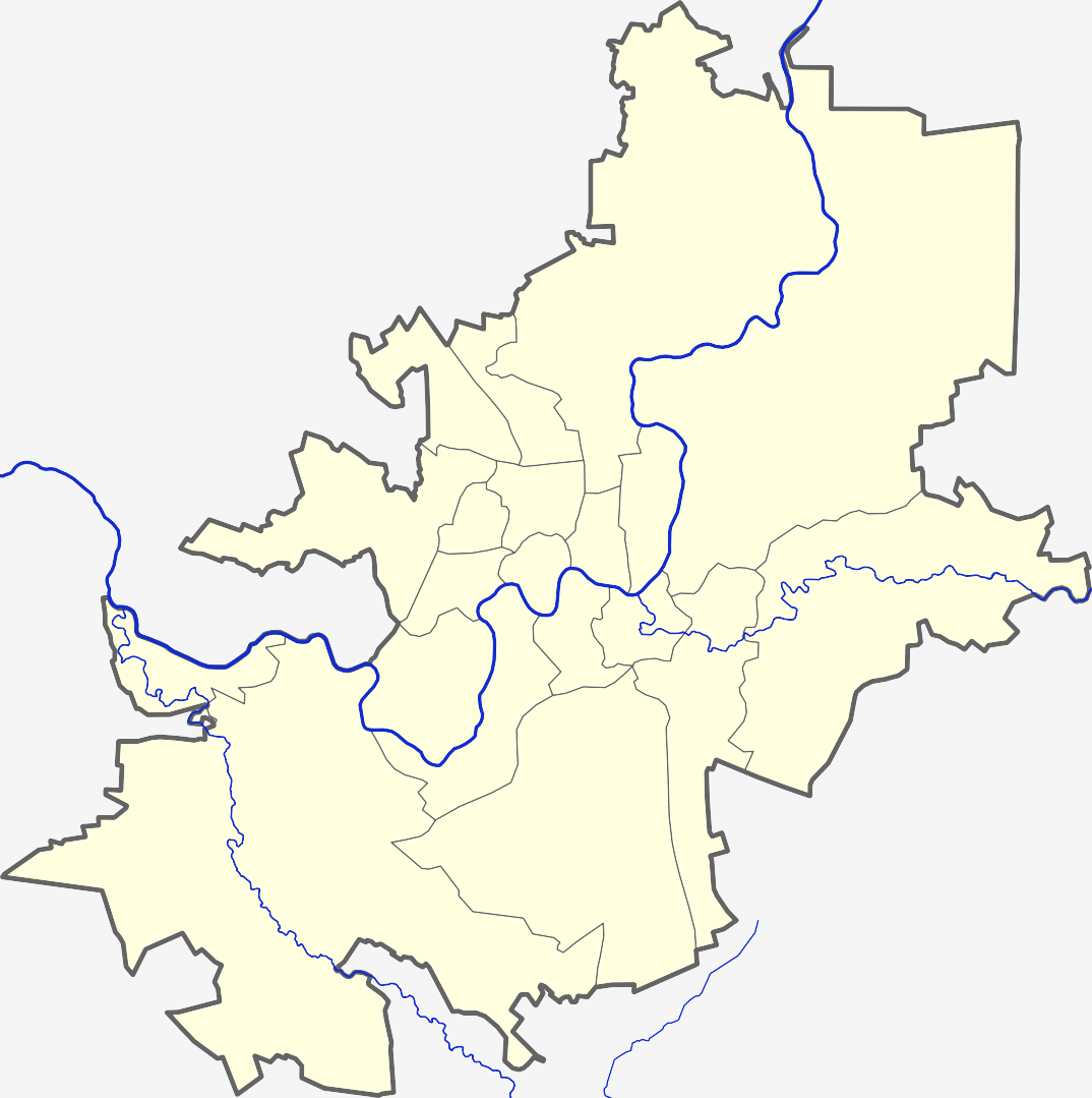 Vilniaus miesto žemėlapis.